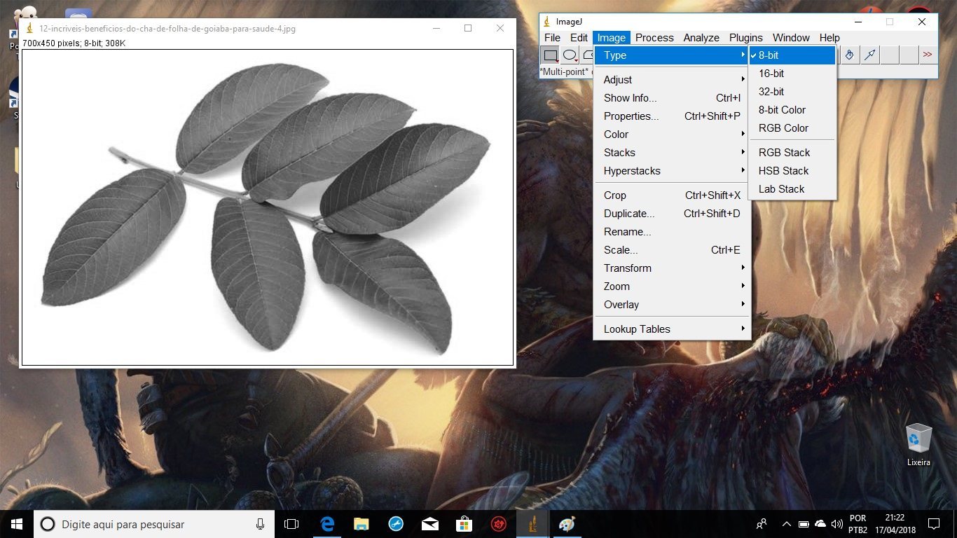 Passo 2.